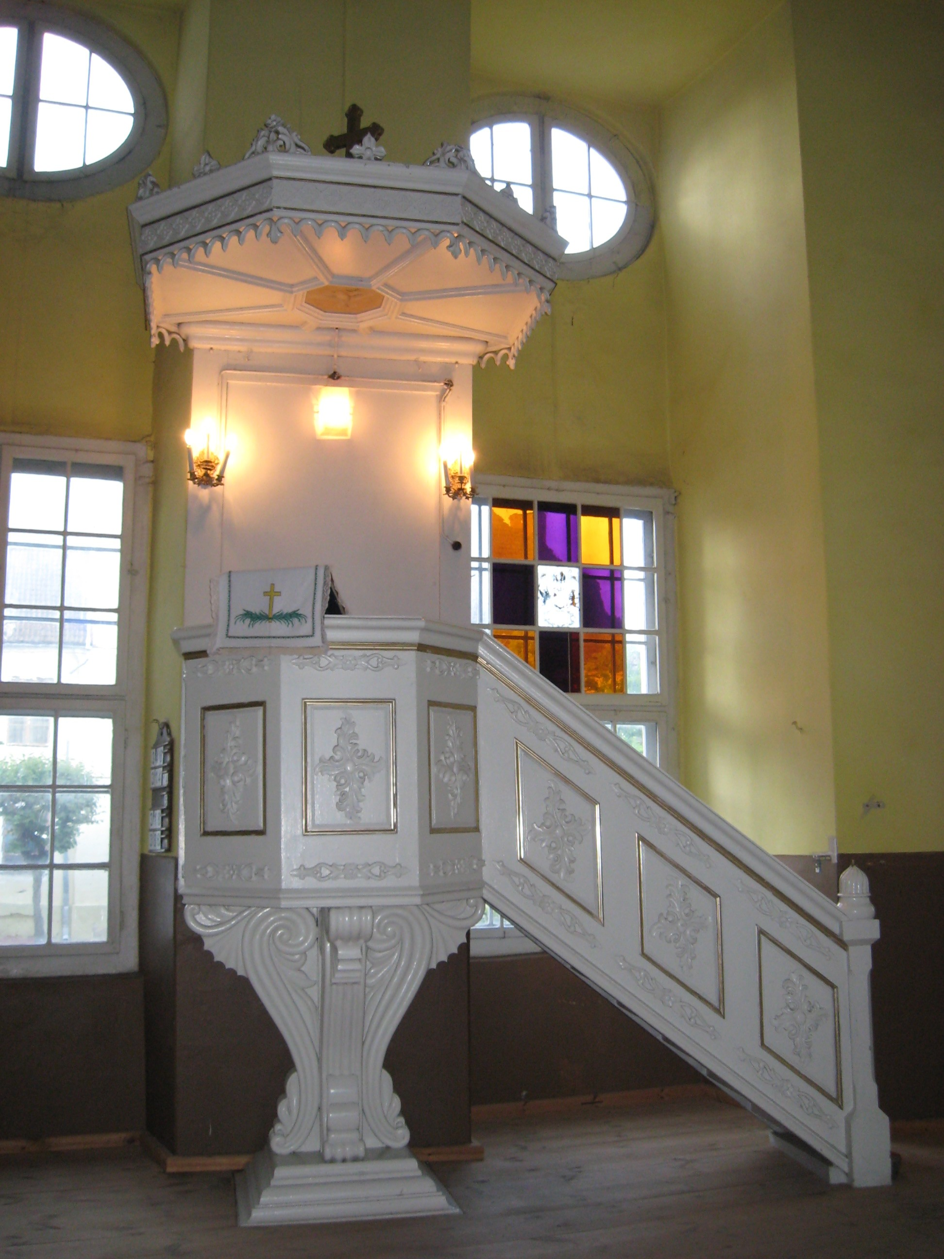 Valga Jaani kiriku klassitsistlik kantsel.